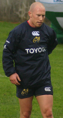 Peter Stringer before the Heineken Cup game between Munster and Bourgoin 2006